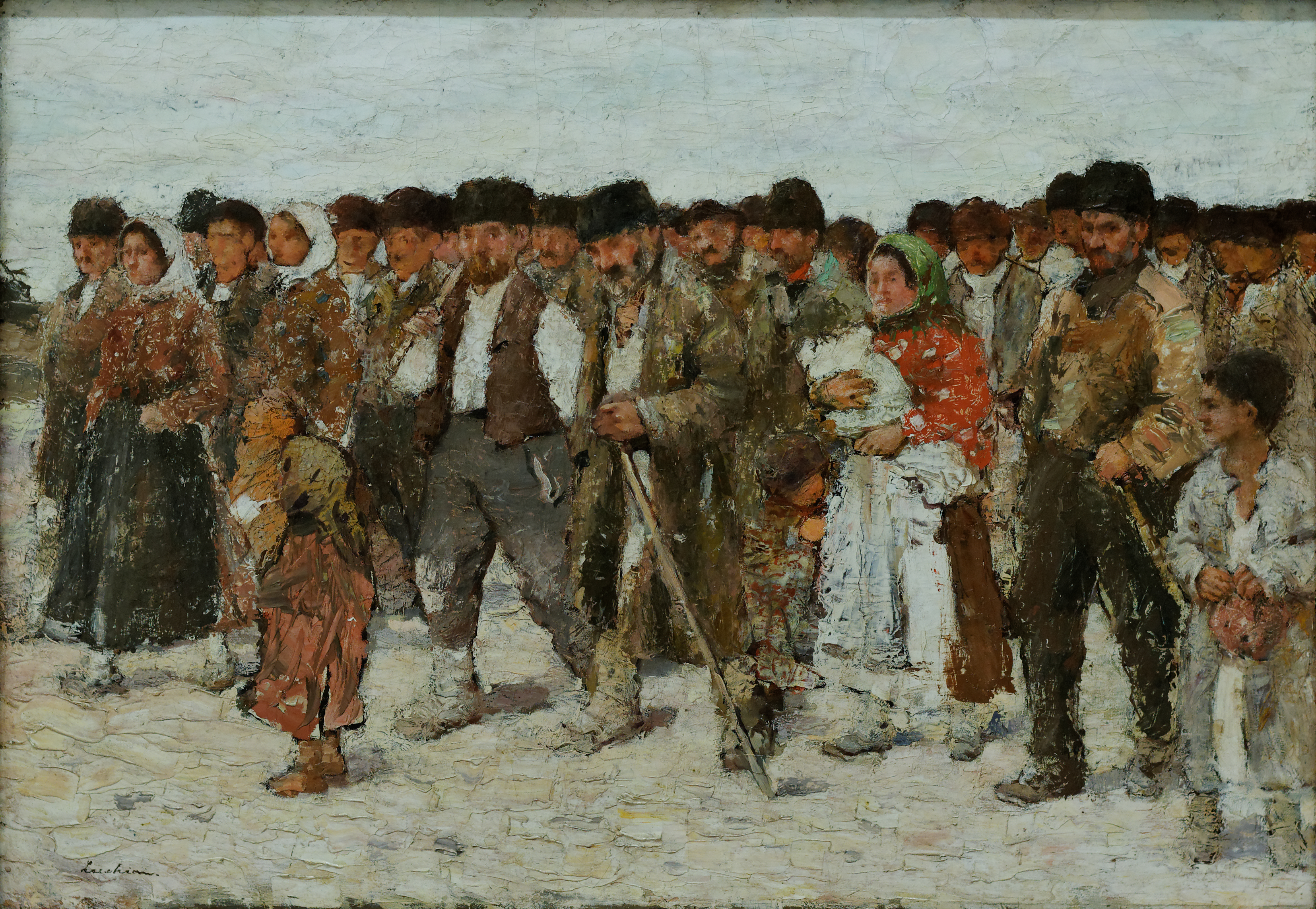 En attendant la répartition du maïs, Stefan Luchian. Muzeul Naţional de Artă al României, Bucarest